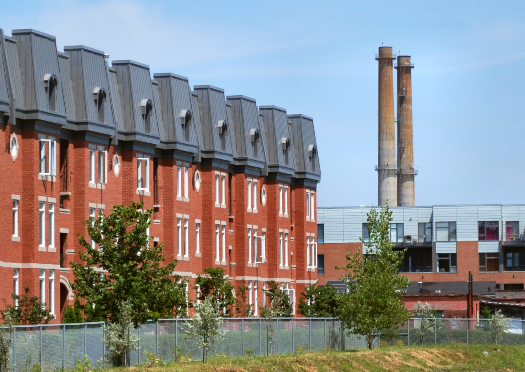 Incinérateur 5 dans le quartier Rosemont à Montréal